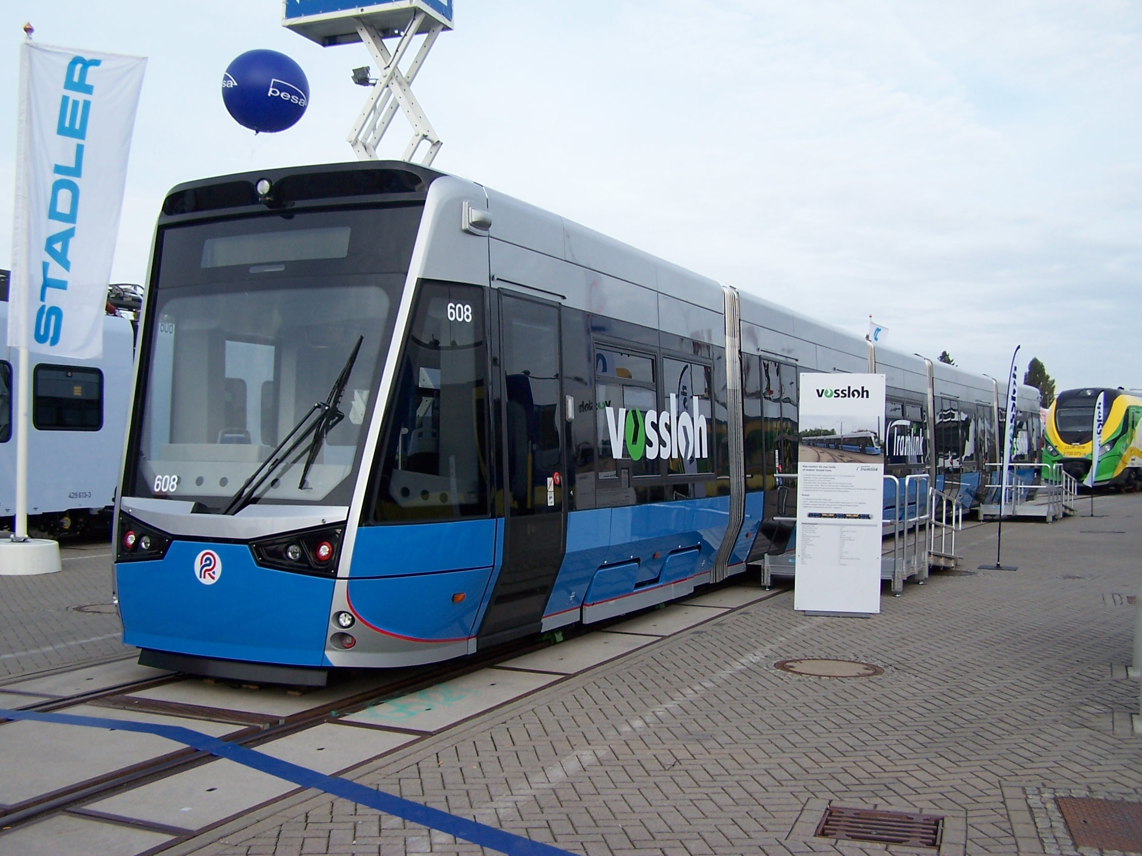 Vossloh Tramlink 6N2 608 der Straßenbahn Rostock auf der InnoTrans 2014.